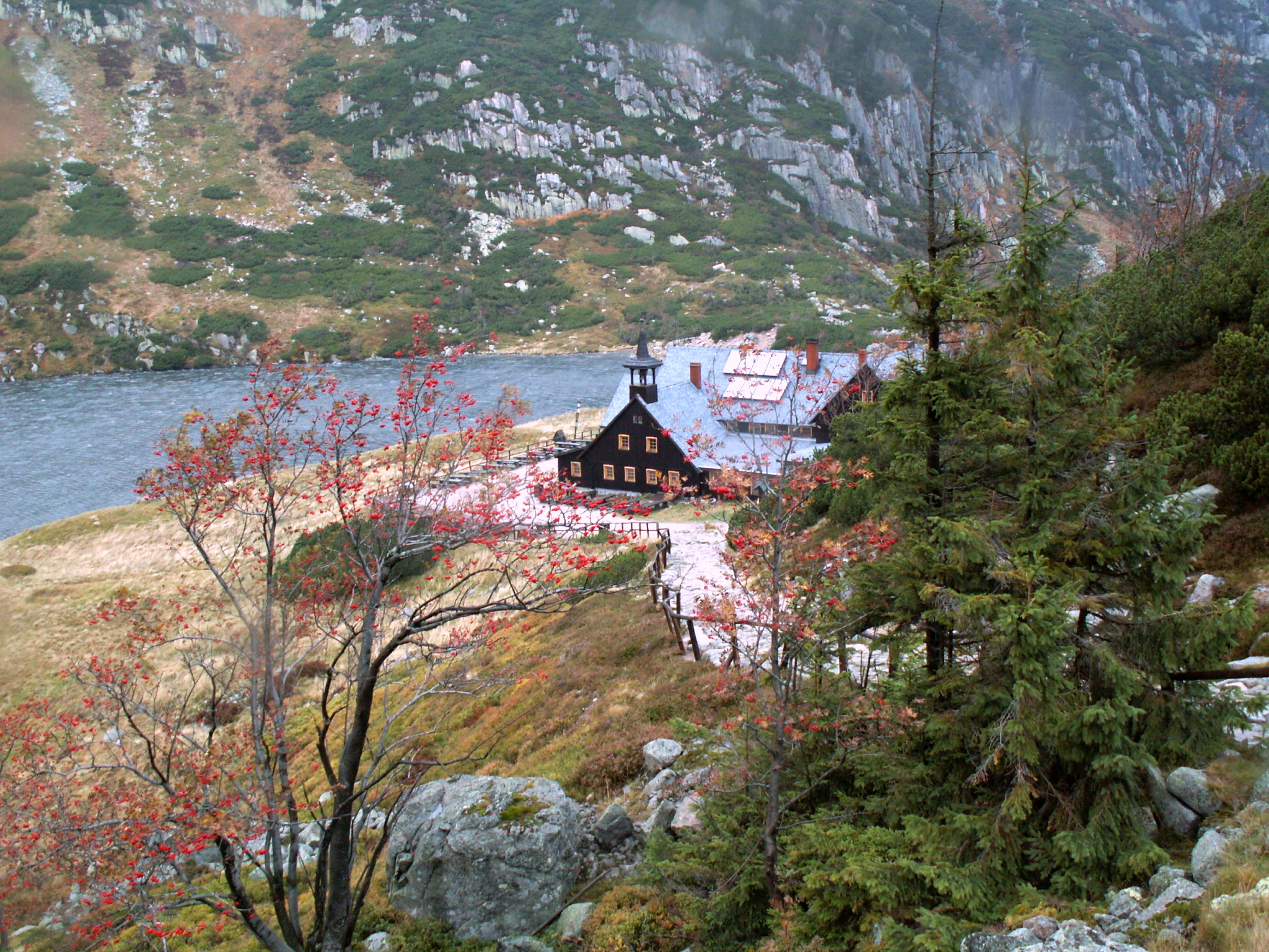 Karpacz, Schronisko Samotnia z góry